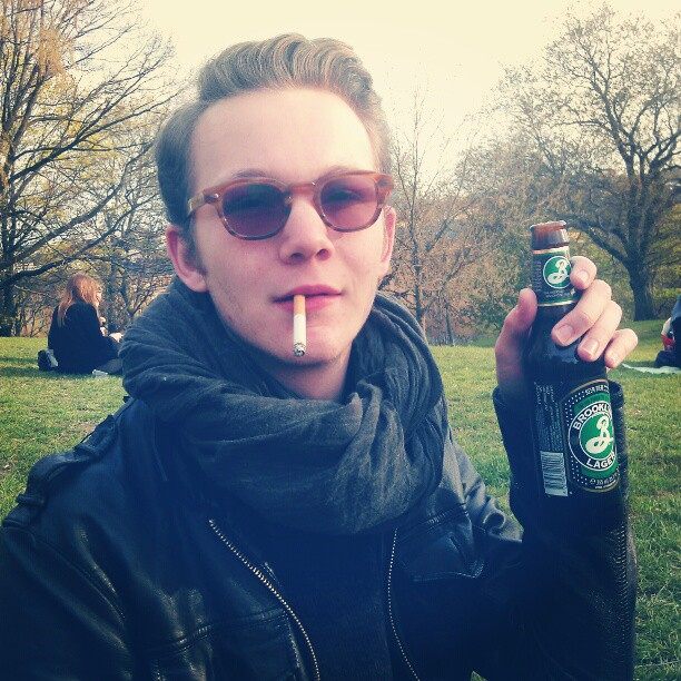 modern Hipster med glasögon, öl av populärt märke samt cigarett i mungipan, Vitabergsparken, Stockholm.